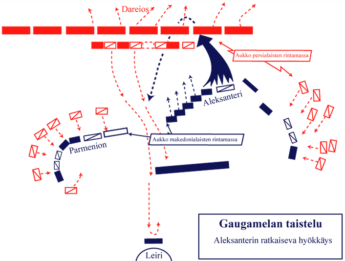 Battle of Gaugamela, Gaugamelan taistelu